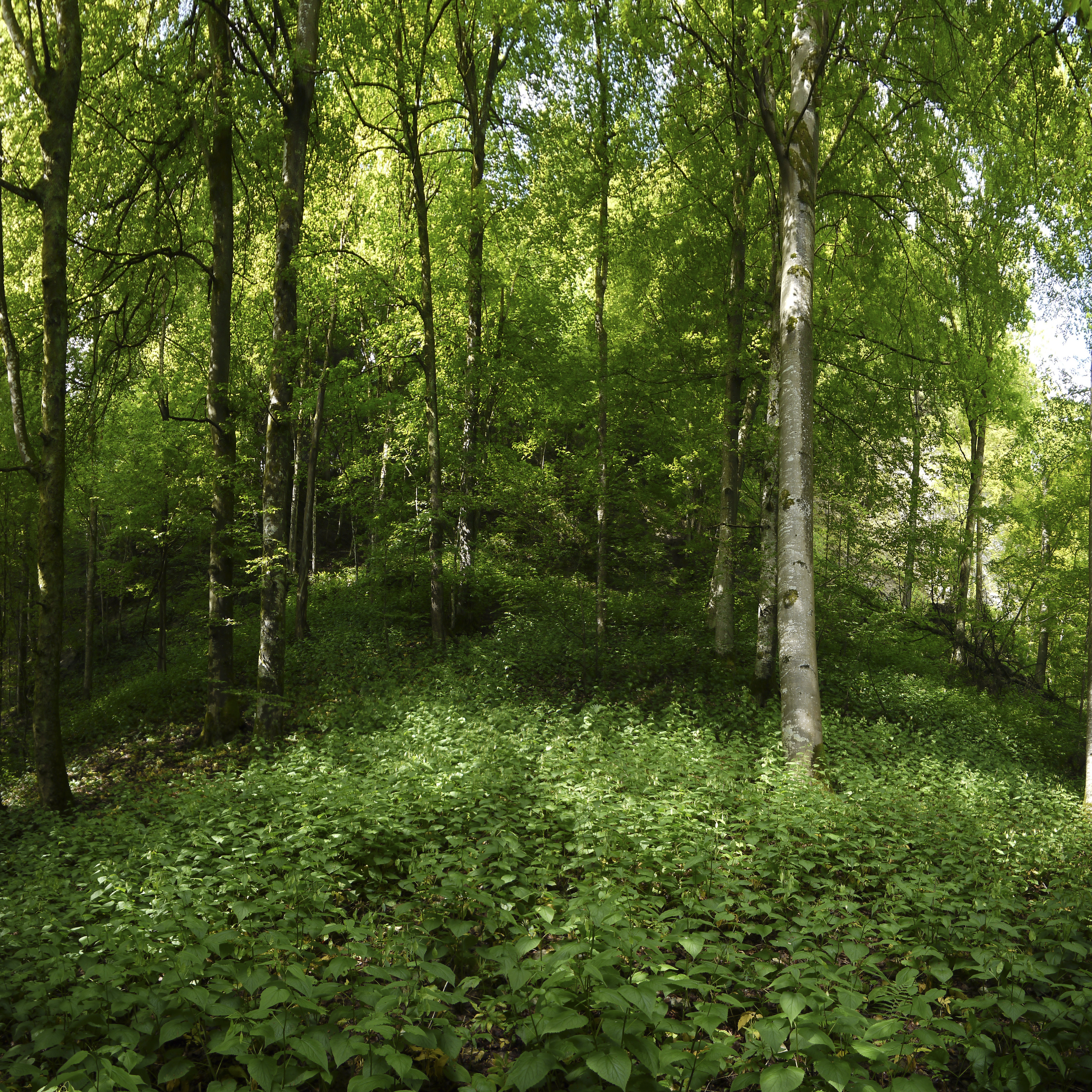 Hobelsberg-Riesn This media shows the nature reserve in Upper Austria with the ID n143.